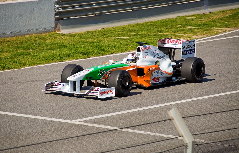 Sutil Barcelona 1/1000s - F/7.1 - 200mm - ISO200